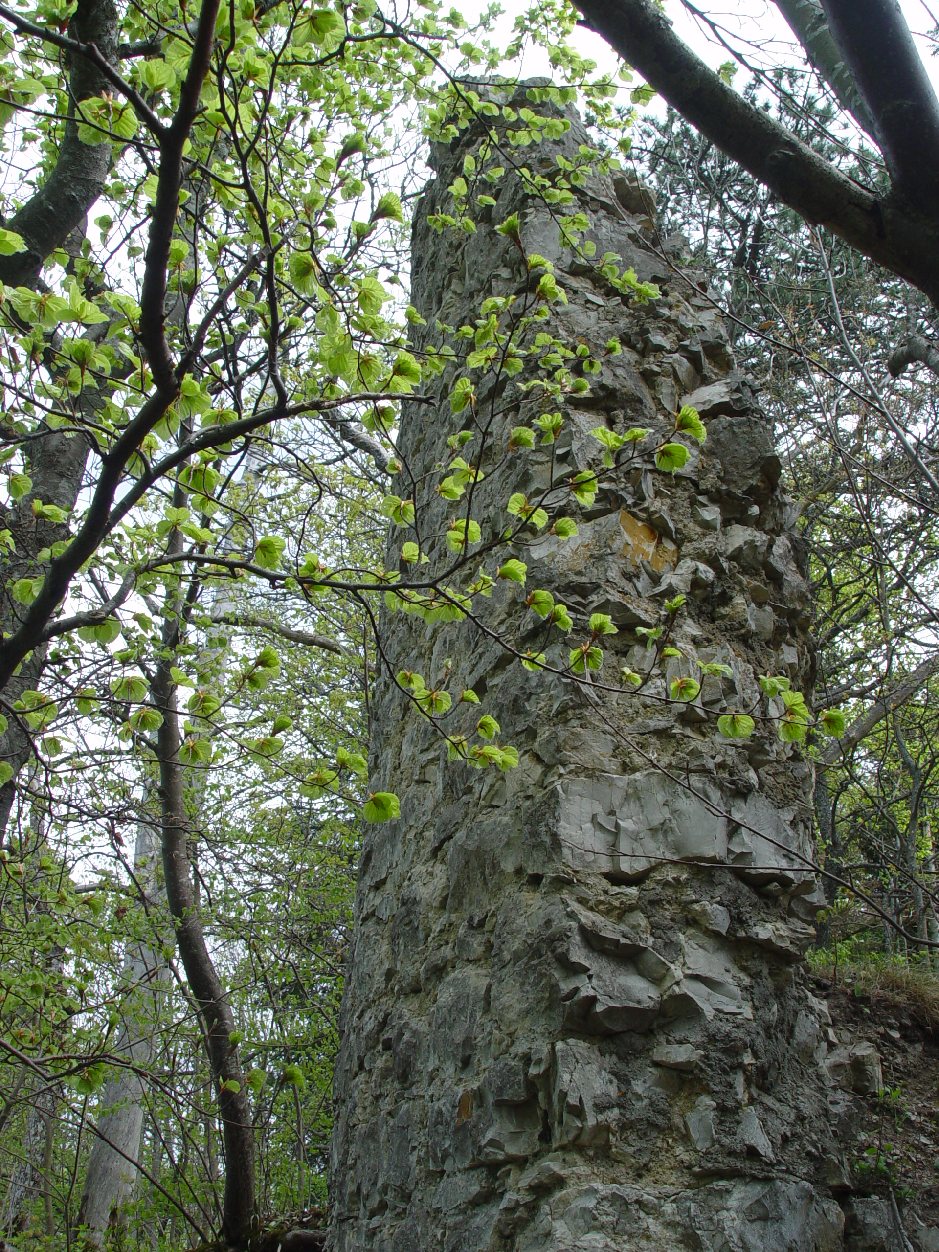 Mauerrest der Schalksburg im Albstädter Ortsteil Burgfelden